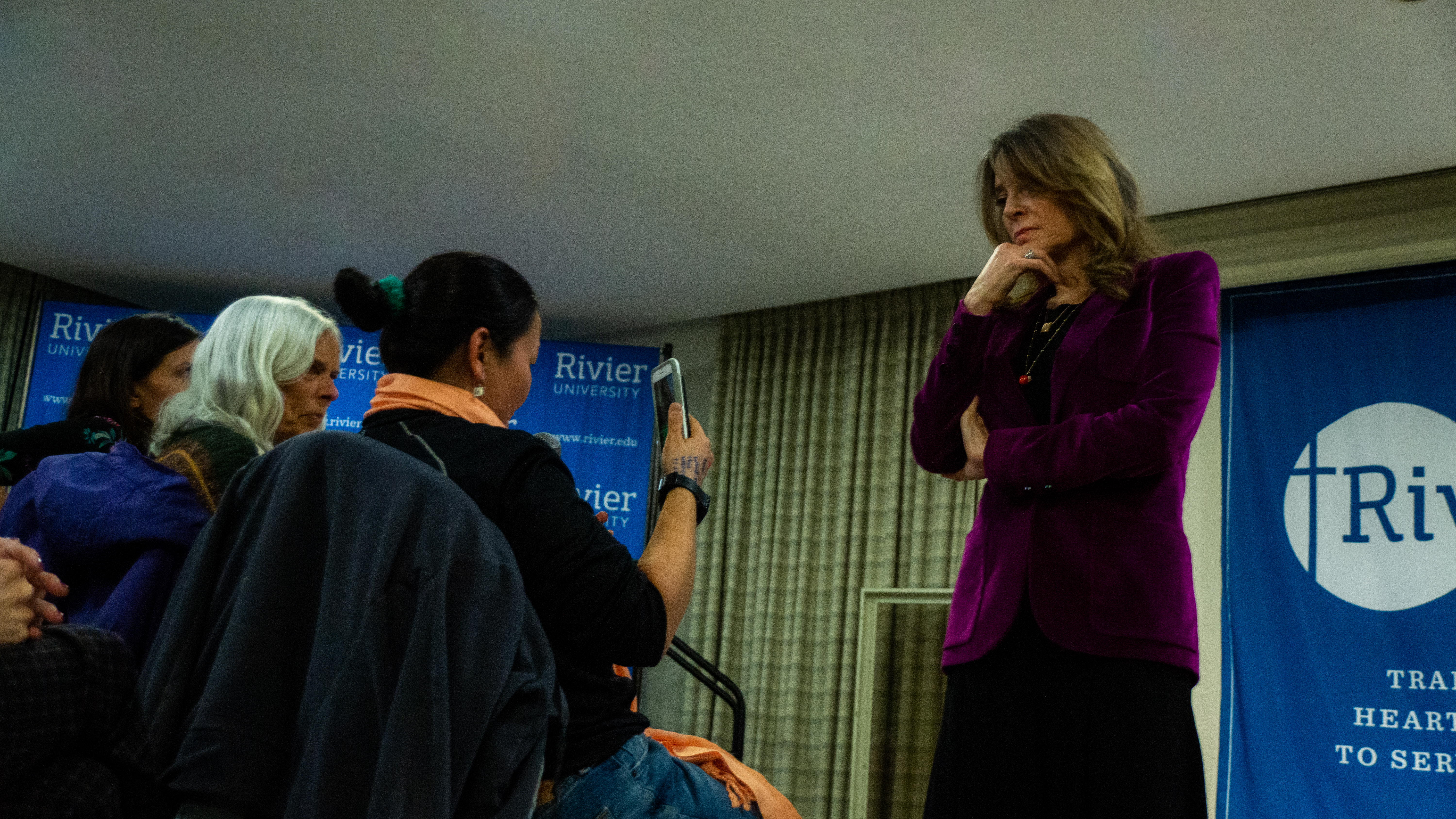 Marianne Williamson